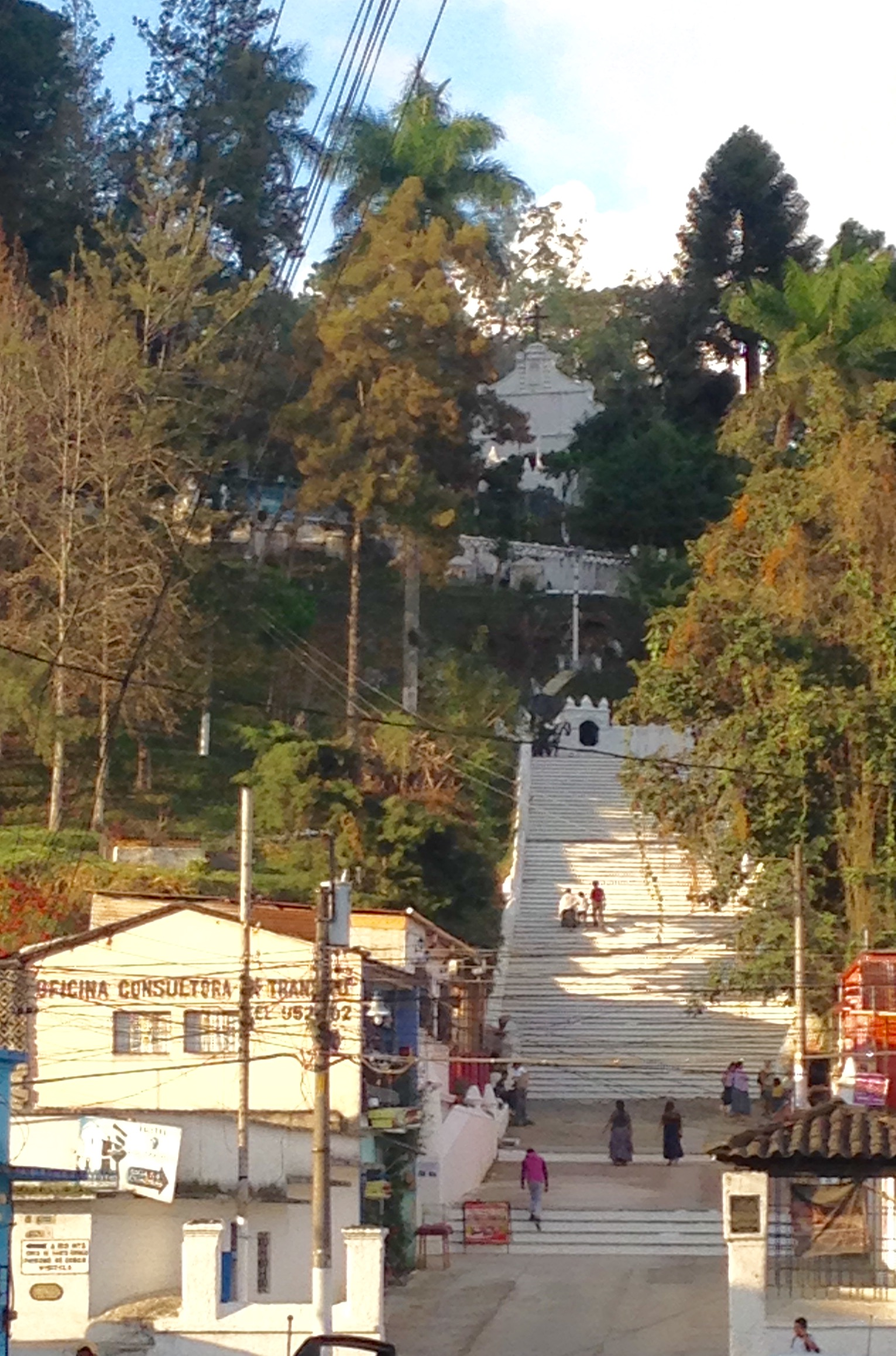 Iglesia del Calvario, Cobán, Alta Verapaz. Diciembre de 2015.